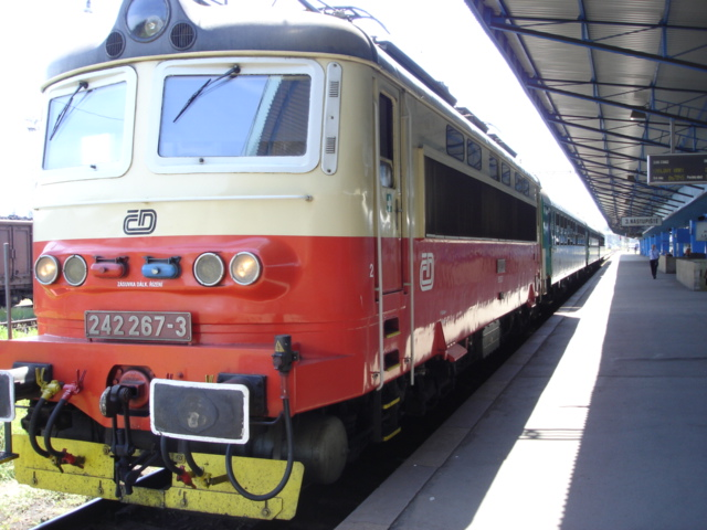 Střídavá elektrická lokomotiva řady 242 vyfocena v Chebu. Mrkvo 21:24, 17. 11. 2005 (UTC)